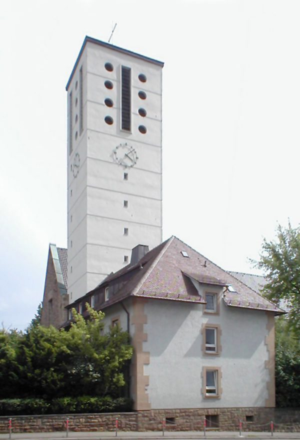 Kath. Augustinuskirche in Heilbronn